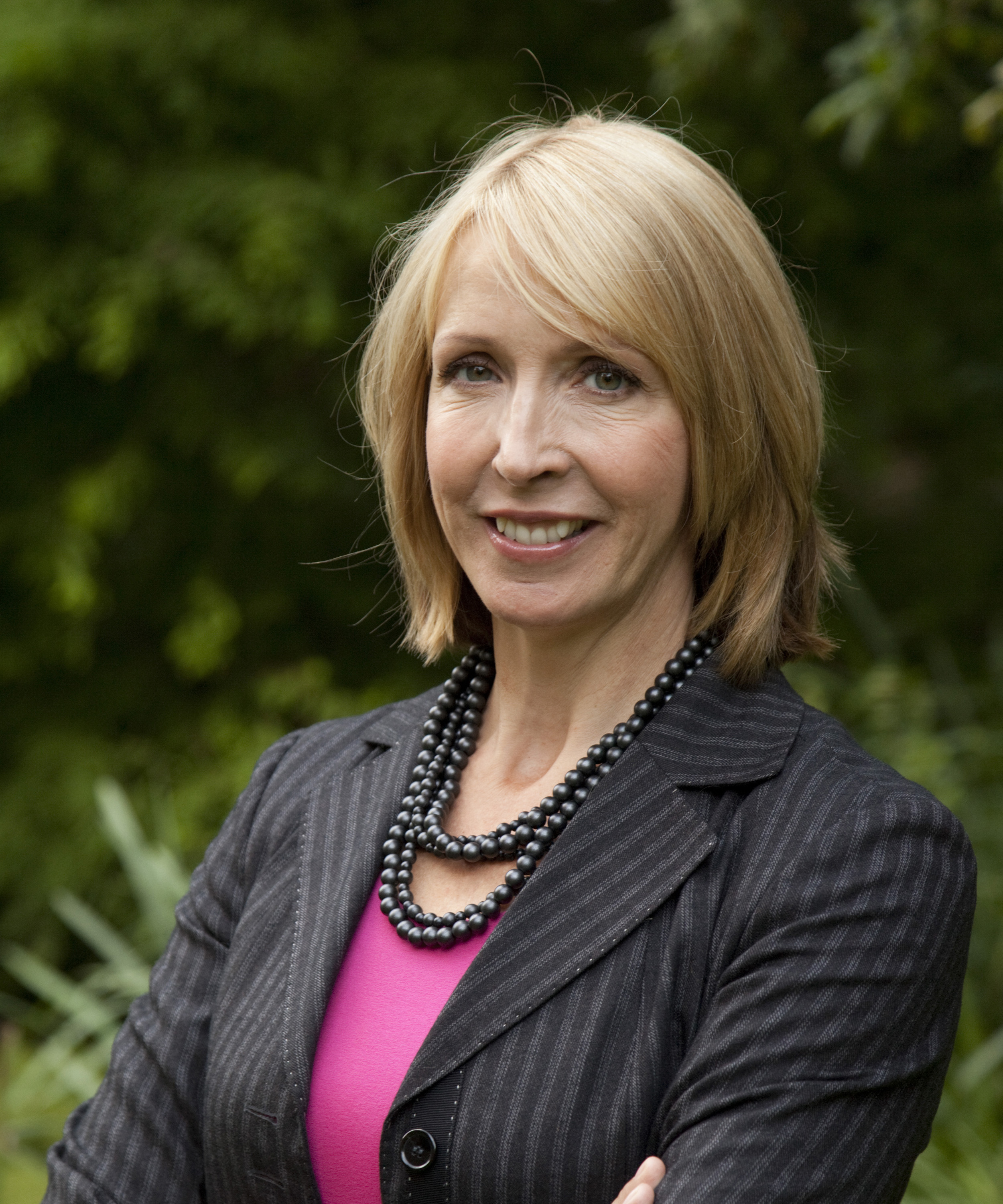 Liesbeth van Tongeren, in 2010.